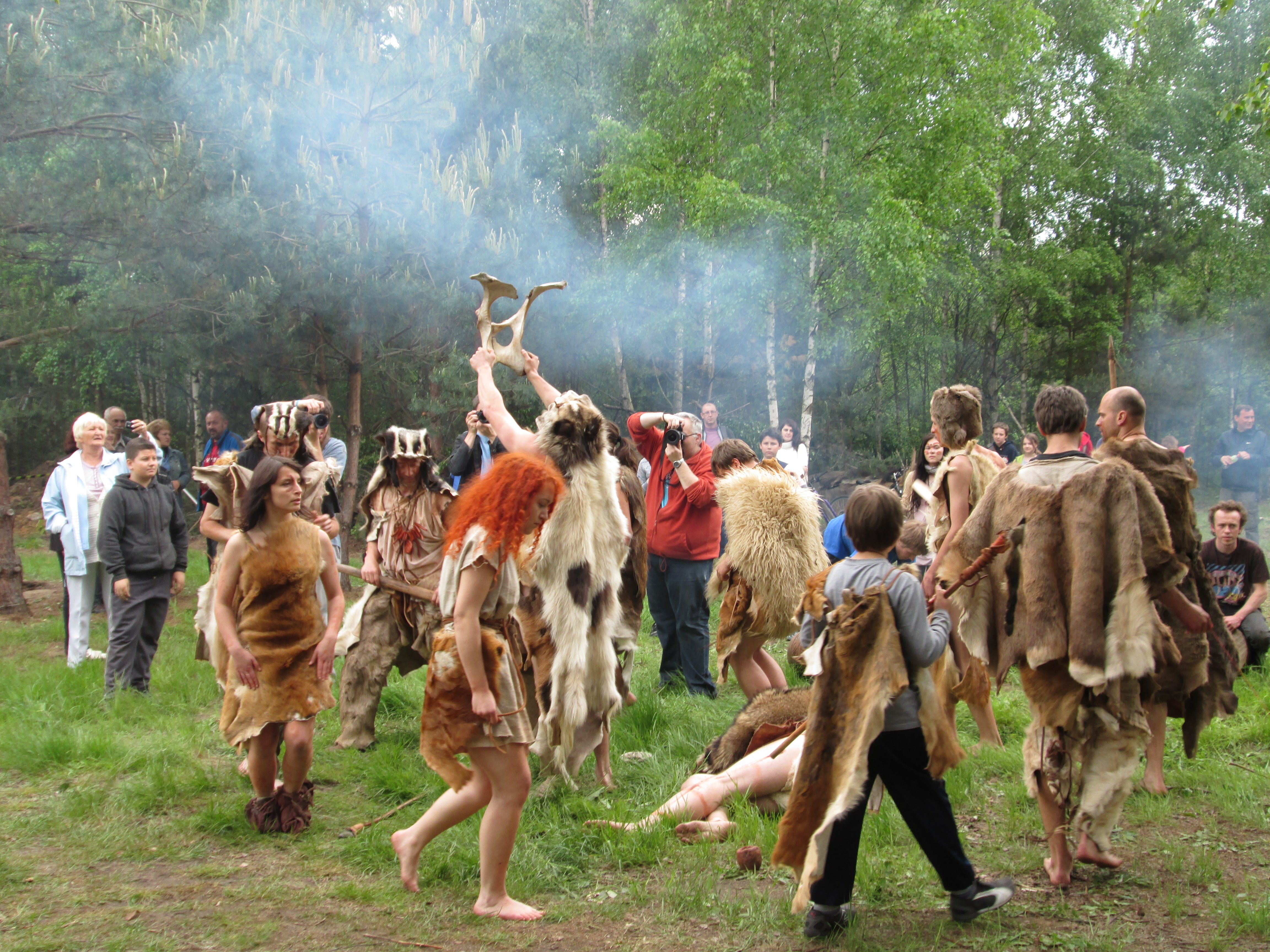 Piknik Archeologiczny "Rydno" w 2013 w Skarżysku-Kamiennej